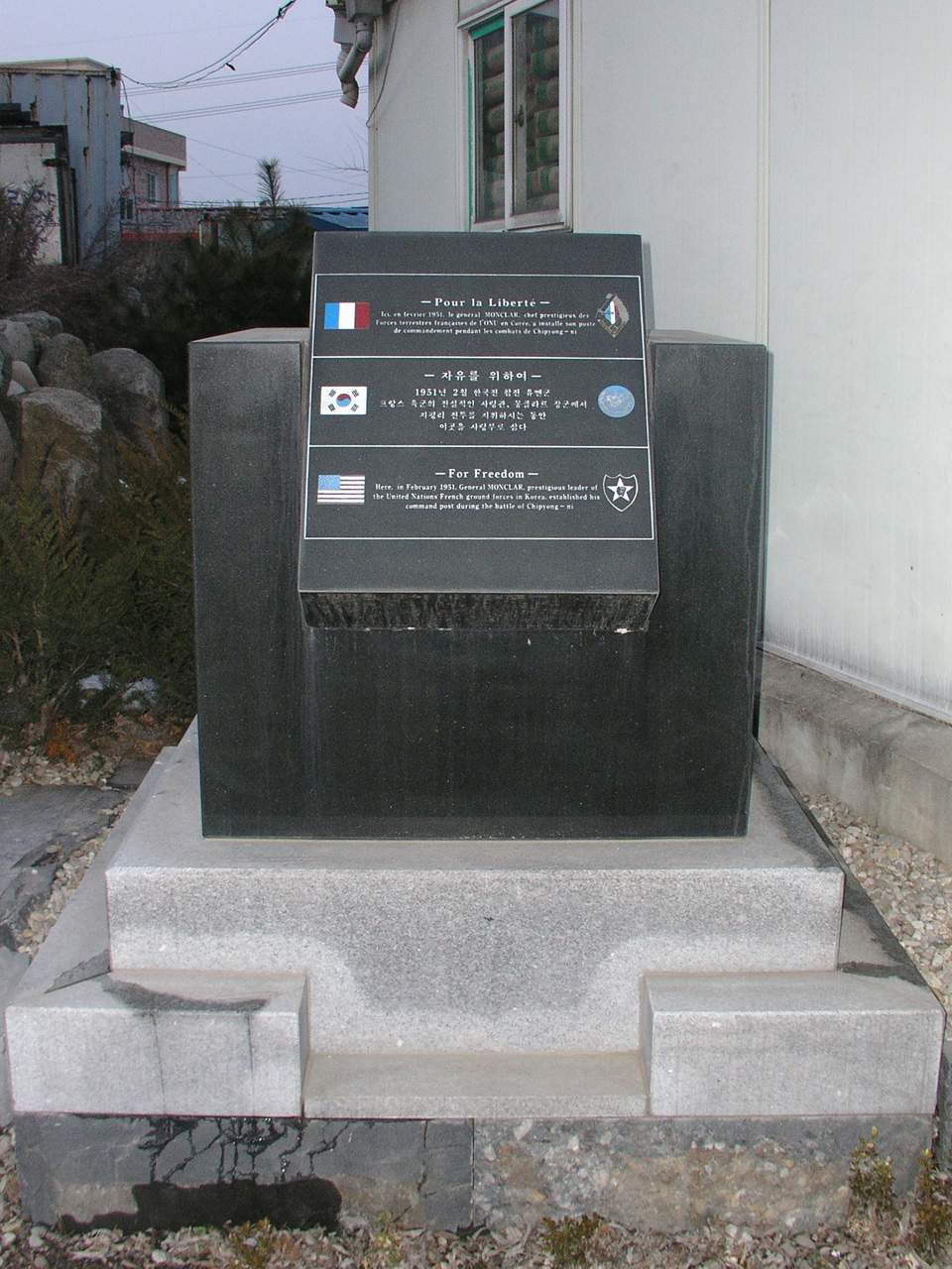 Le monument de la bataille de Jipyeong-ri, à coté de la brasserie de Jipyeong, qui signifie que Raoul Magrin-Vernerey a utilisé cette brasserie comme poste de commandement pendant la bataille.